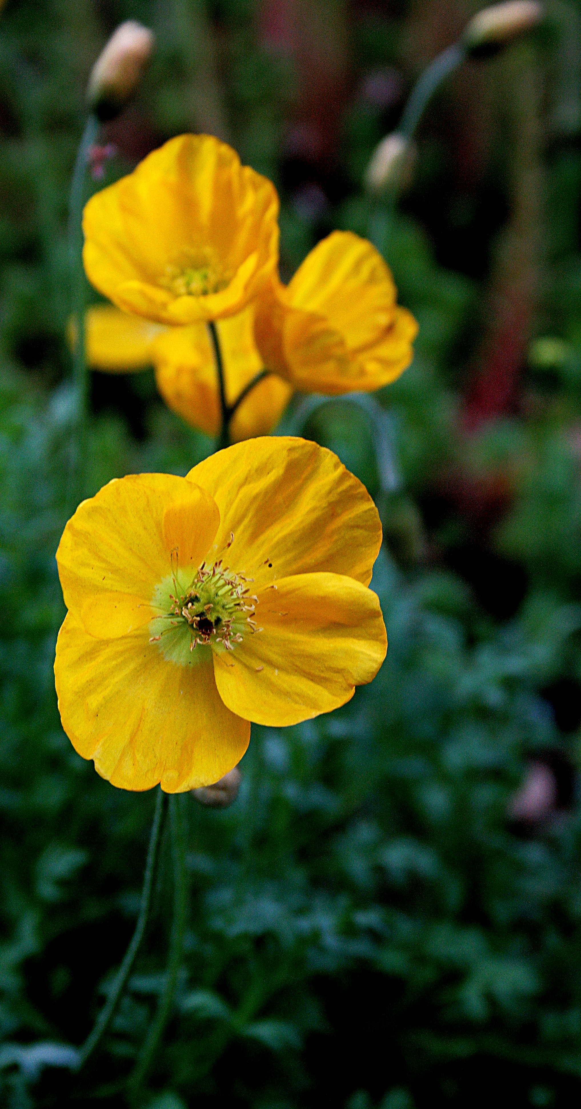 Ísland, Akureyri Botanical Gardens: Kerners_Alpenmohn_(Papaver_kerneri).